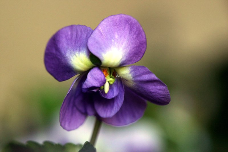 Violette de Toulouse, St Sever (40)